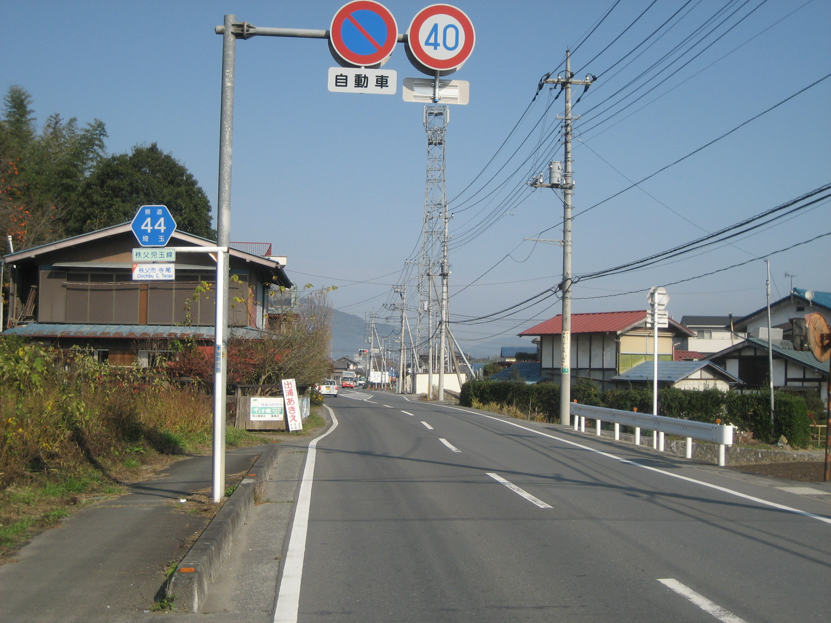 埼玉県道44号線秩父市内